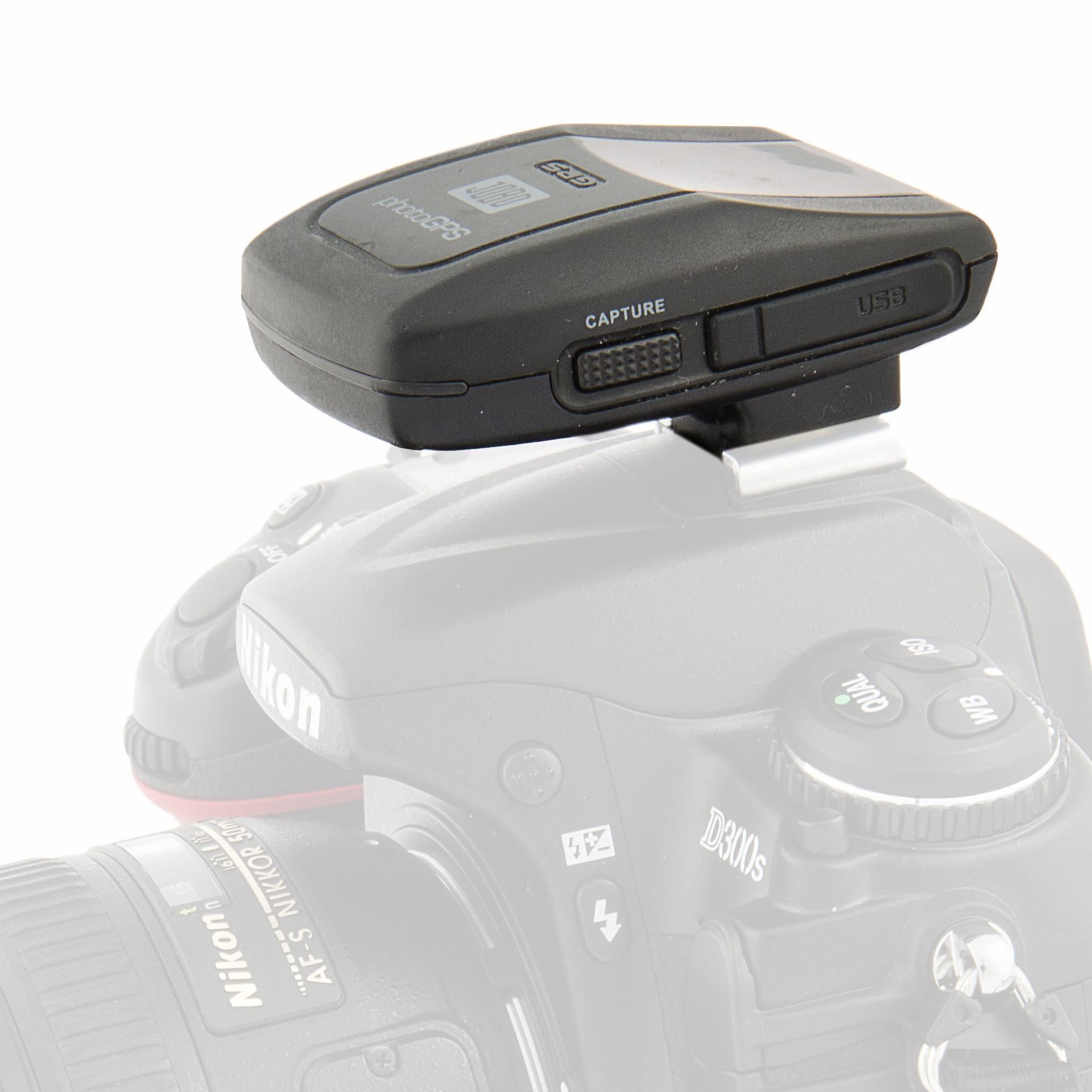 Nikon D300s GPS- Empfänger "Jobo photoGPS"